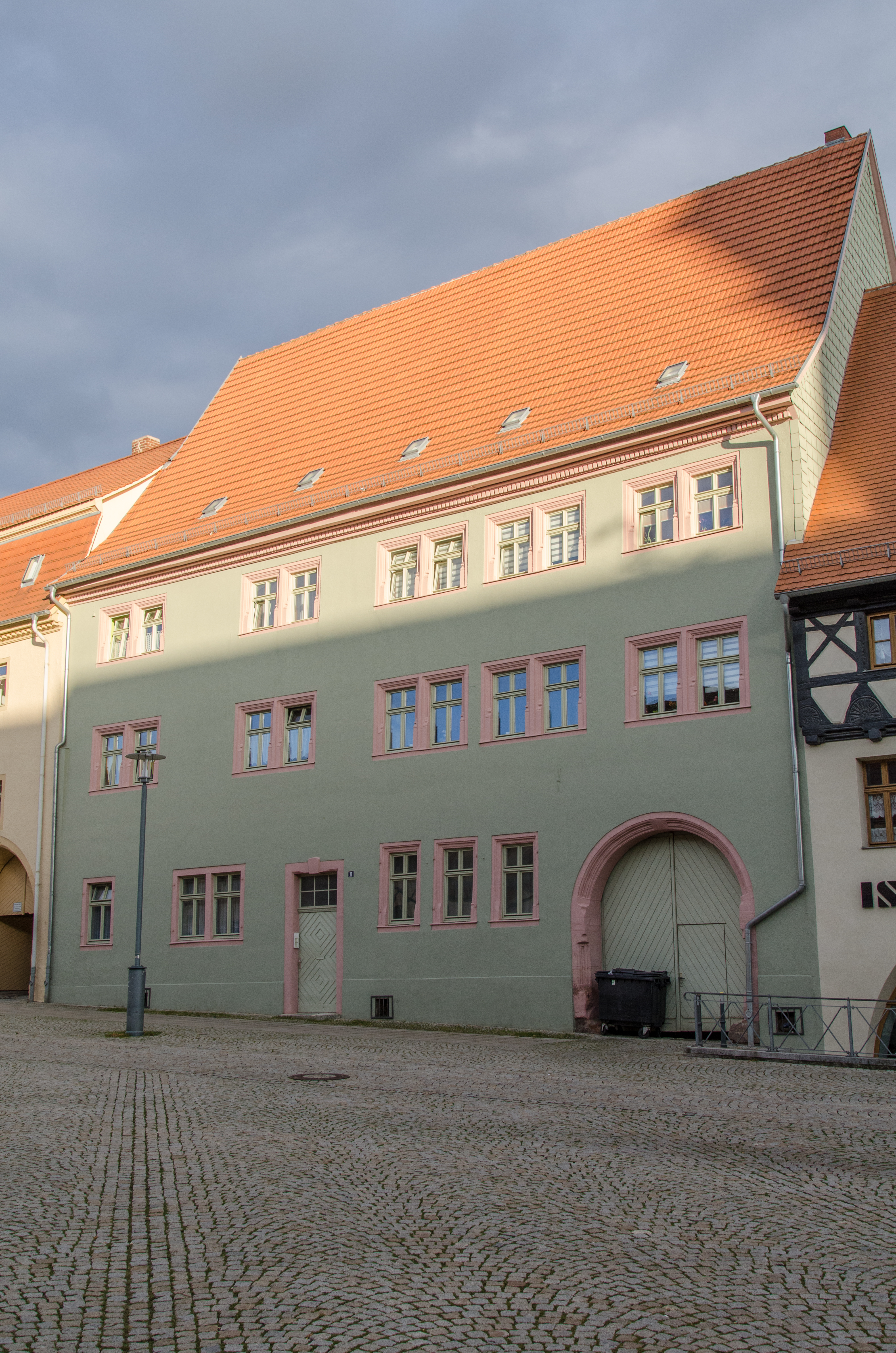 Sangerhausen, Markt 11